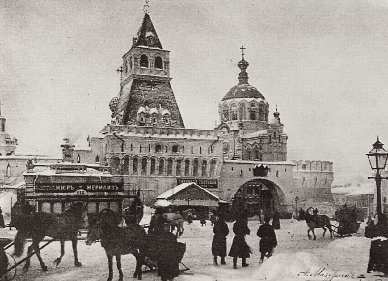 Mazurin, Aleksej Sergeevič: Blick auf den Ljubjanskaja-Platz im Zentrum von Moskau